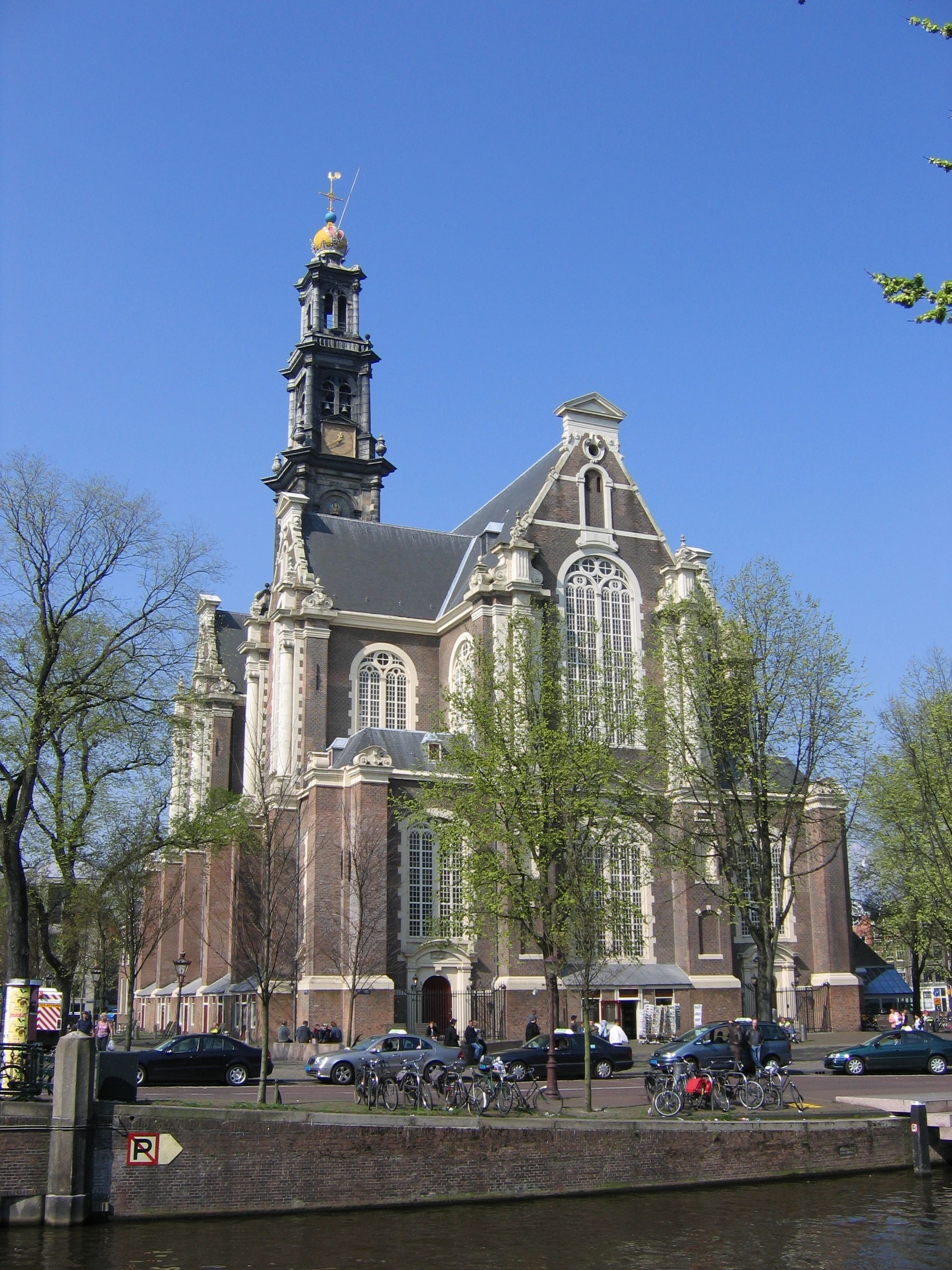 Amsterdam Wester Kerk (West Church)